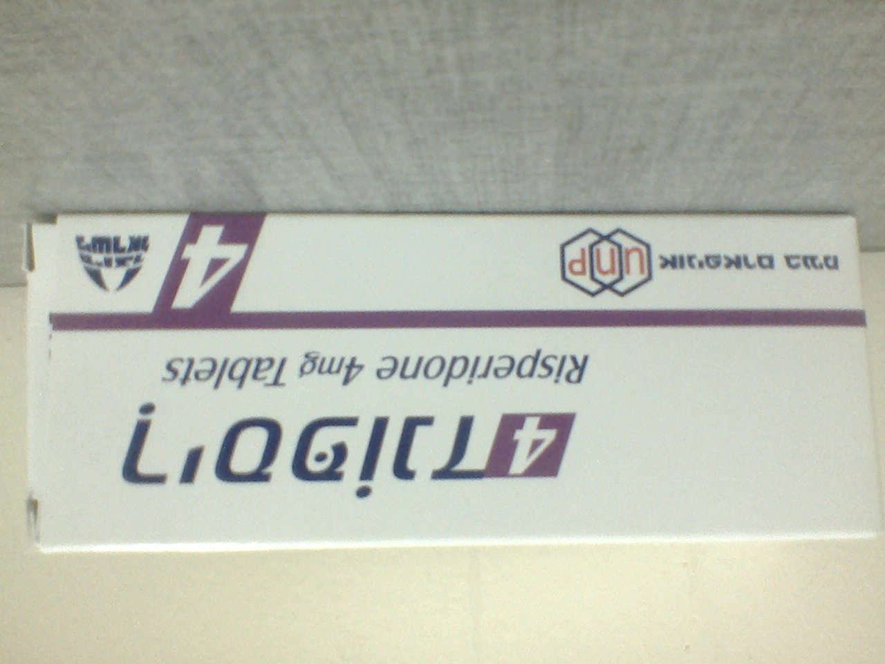 תמונה של התרופה:ריספונד